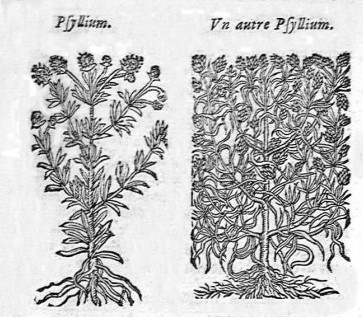 Psyllium Plantain pucier